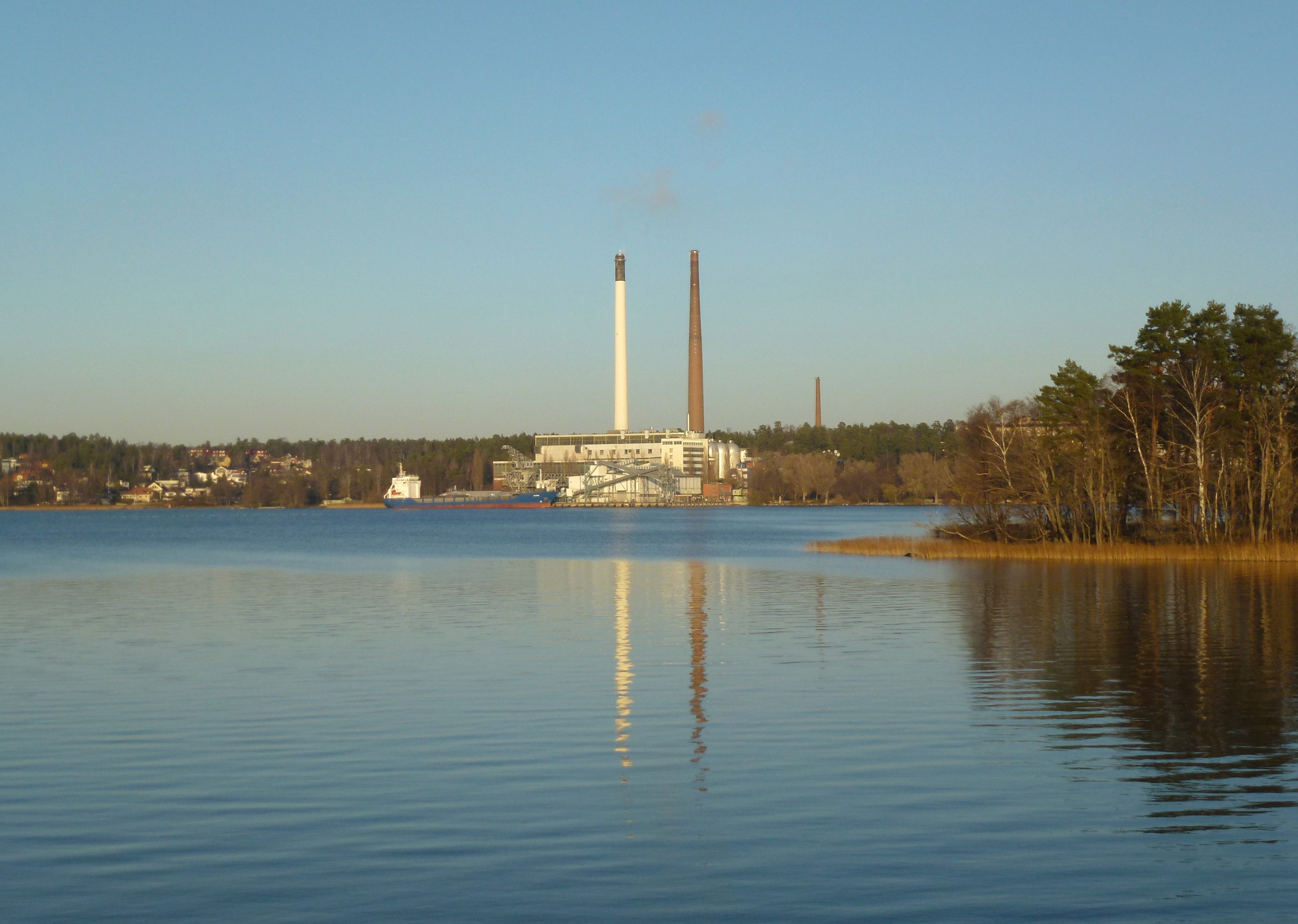 Lambarfjärden utanför Lambarudd på Lovön, Ekerö kommun